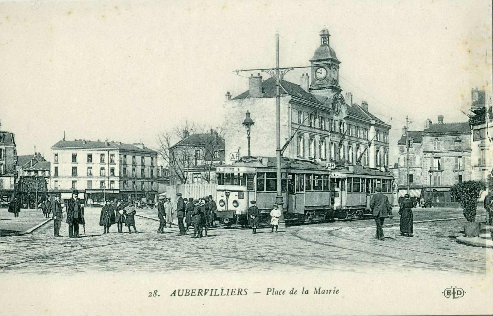 Carte postale ancienne éditée par ELD N°28 AUBERVILLIERS : Place de la Mairie Gros plan du terminus des tramways électriques ligne AR